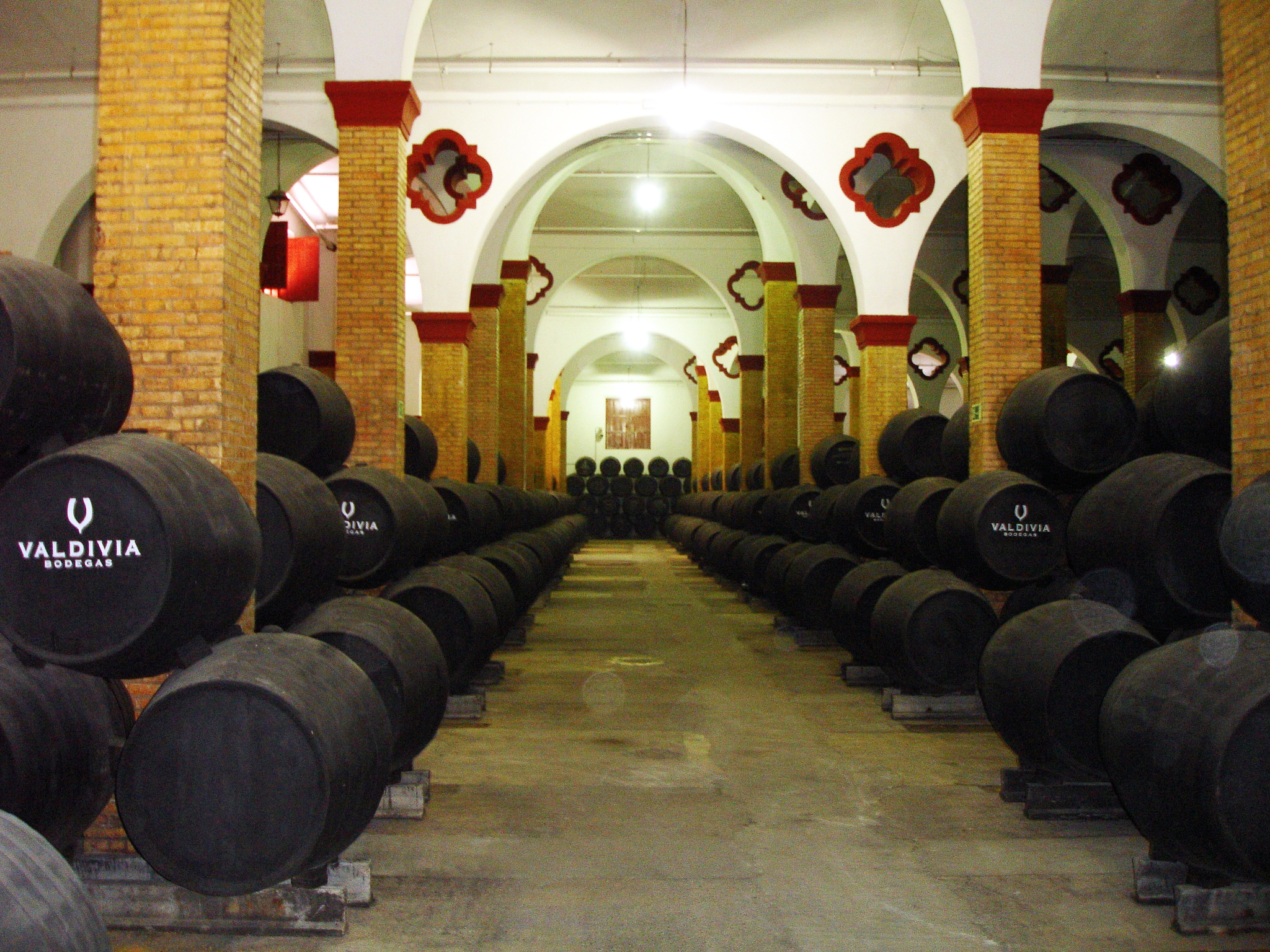 Valdivia in Jerez, Andalusia (Spain)